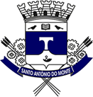 Brasão do Município de Santo Antônio do Monte